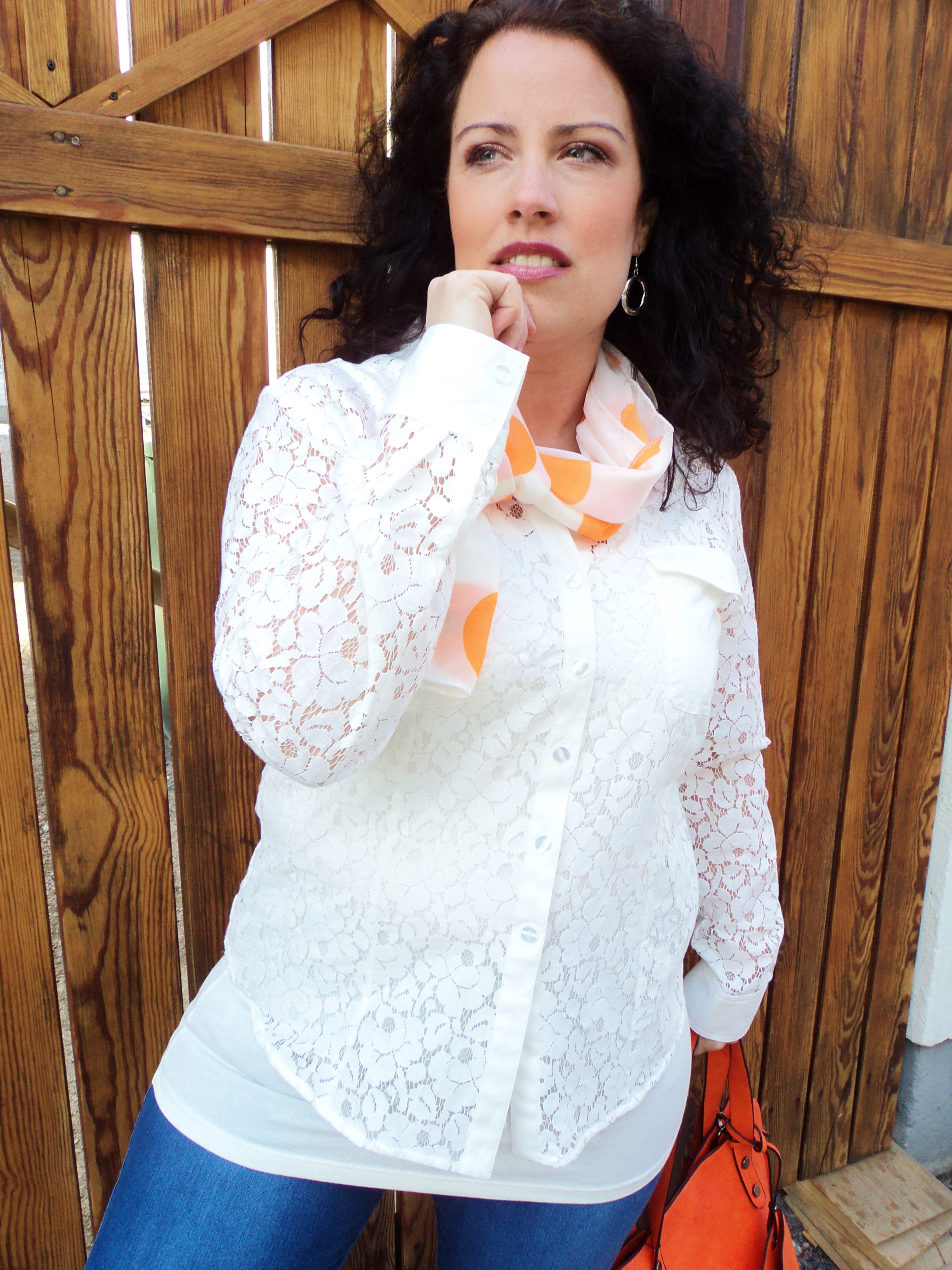 Vår och sommarkläder. CaroAnz kläder AB och deras modell Frida Lindgren Karlsson